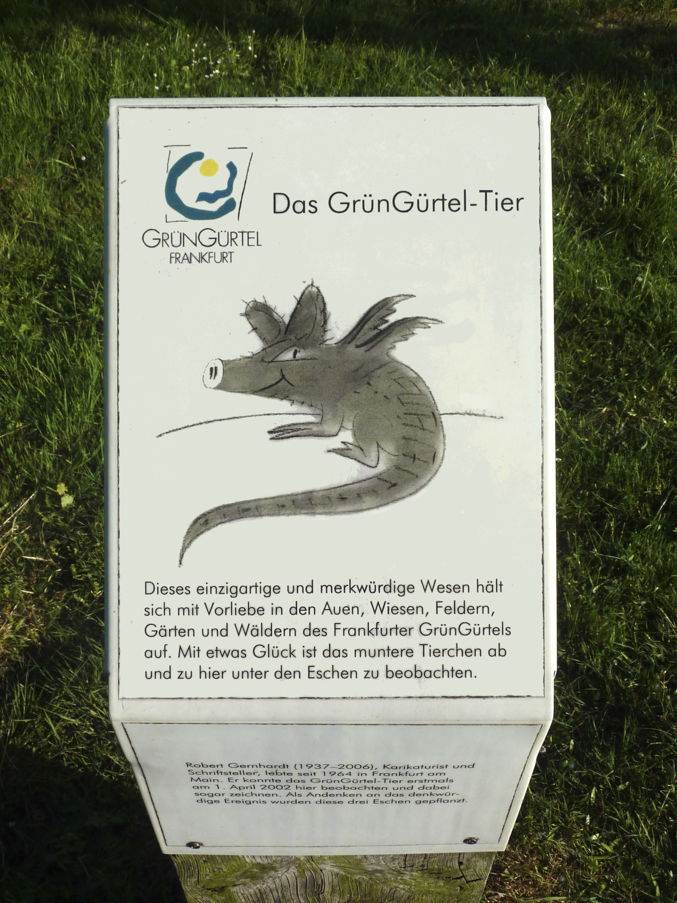 Frankfurter Grüngürtel: Infostele zu der von Robert Gernhardt entworfenen Sympathiefigur GrünGürtel-Tier. Standort der Stele sind die Gernhardt-Eschen an der Wörthspitze in Frankfurt-Nied, nahe der Mündung des Flusses Nidda in den Main. Aufschrift der Stele: „GrünGürtel Frankfurt – Das GrünGürtel-Tier. Dieses einzigartige und merkwürdige Wesen hält sich mit Vorliebe in den Auen, Wiesen, Feldern, Gärten und Wäldern des Frankfurter GrünGürtels auf. Mit etwas Glück ist das muntere Tierchen ab und zu hier unter den Eschen zu beobachten. Robert Gernhardt (1937–2006), Karikaturist und Schriftsteller, lebte seit 1964 in Frankfurt am Main. Er konnte das GrünGürtel-Tier erstmals am 1. April 2002 hier beobachten und dabei sogar zeichnen. Als Andenken an das denkwürdige Ereignis wurden diese drei Eschen gepflanzt.“